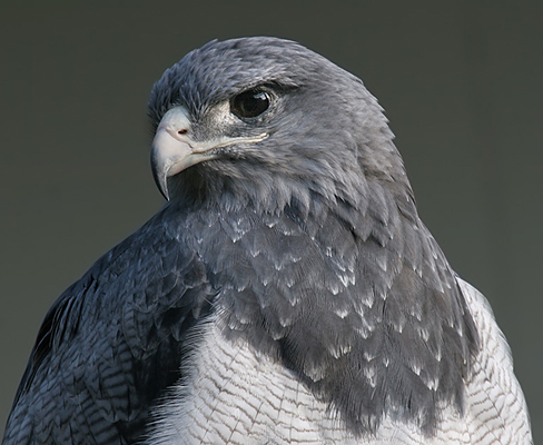 Blaubussard im Tierpark Berlin